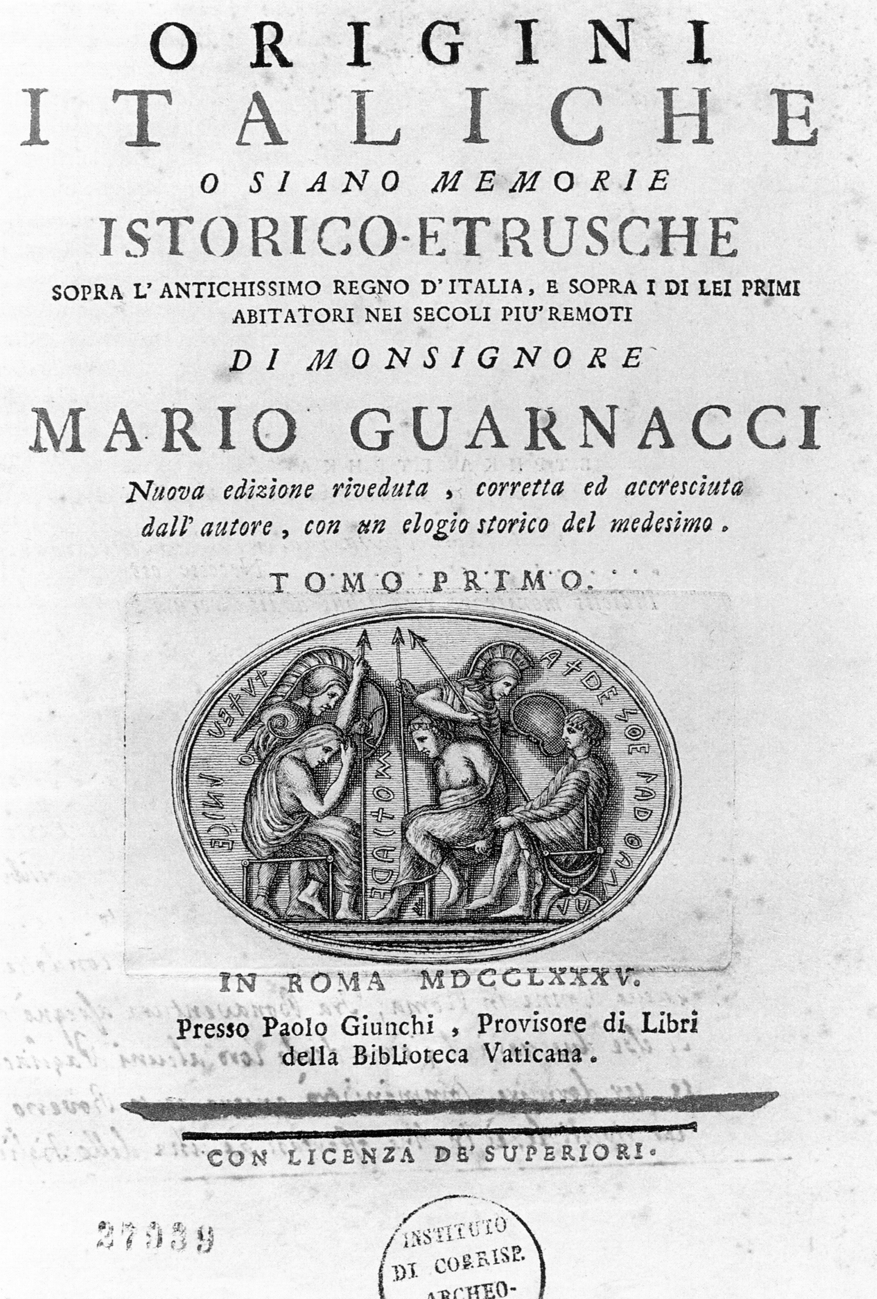 Mario Guarnacci: Origini Italiche, 1785 Source Stephan Steingräber und Horst Blanck: Volterra. Zabern, Mainz 2002, S. 39